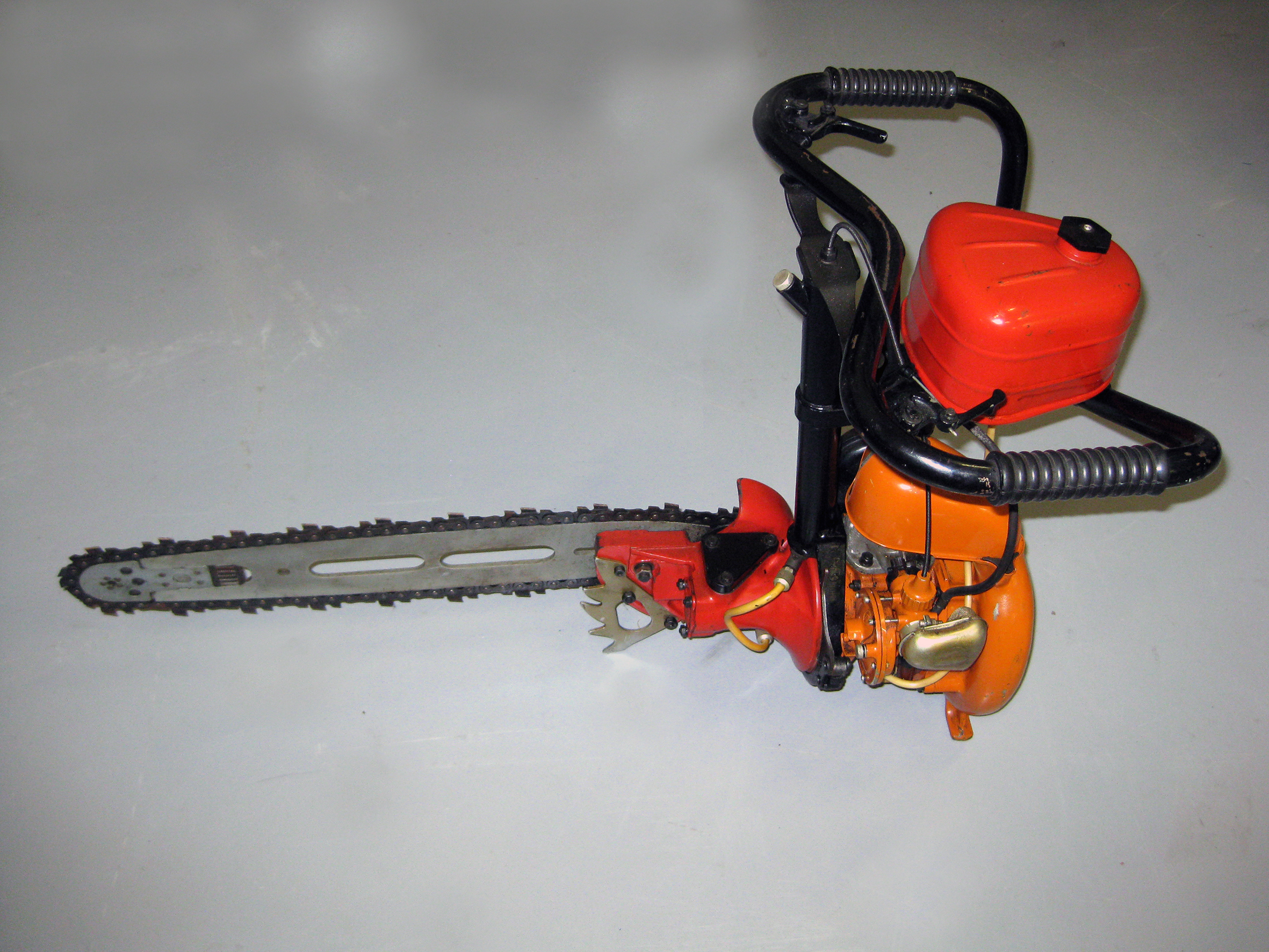 Найбільш масова радянська бензопилка "Дружба-4". Зовнішній вигляд в положенні для кряжування колод.